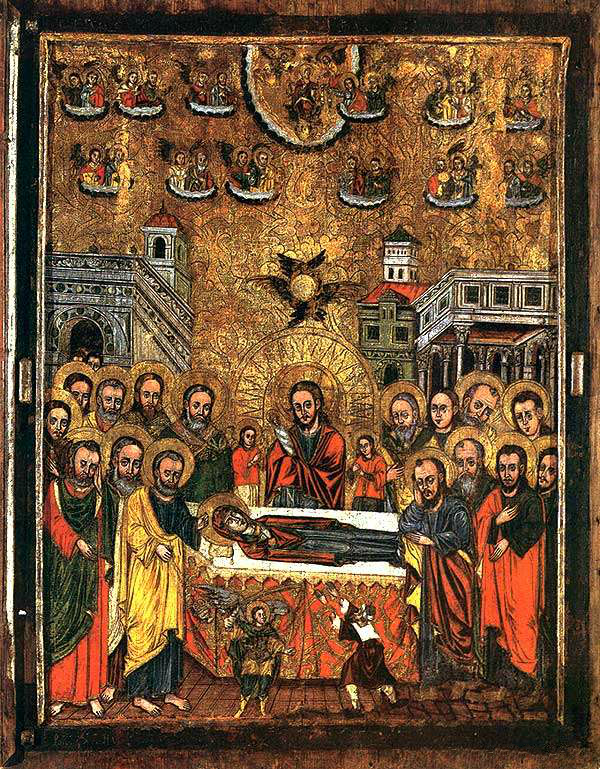 Маларыцкі майстар. Успенне. Дошка, яечная тэмпера. 119х94х3-5. 1650 г. З Праабражэнскай царквы вескі Олтуш Брэсцкай вобласці. Нацыянальны мастацкі музей Беларусі